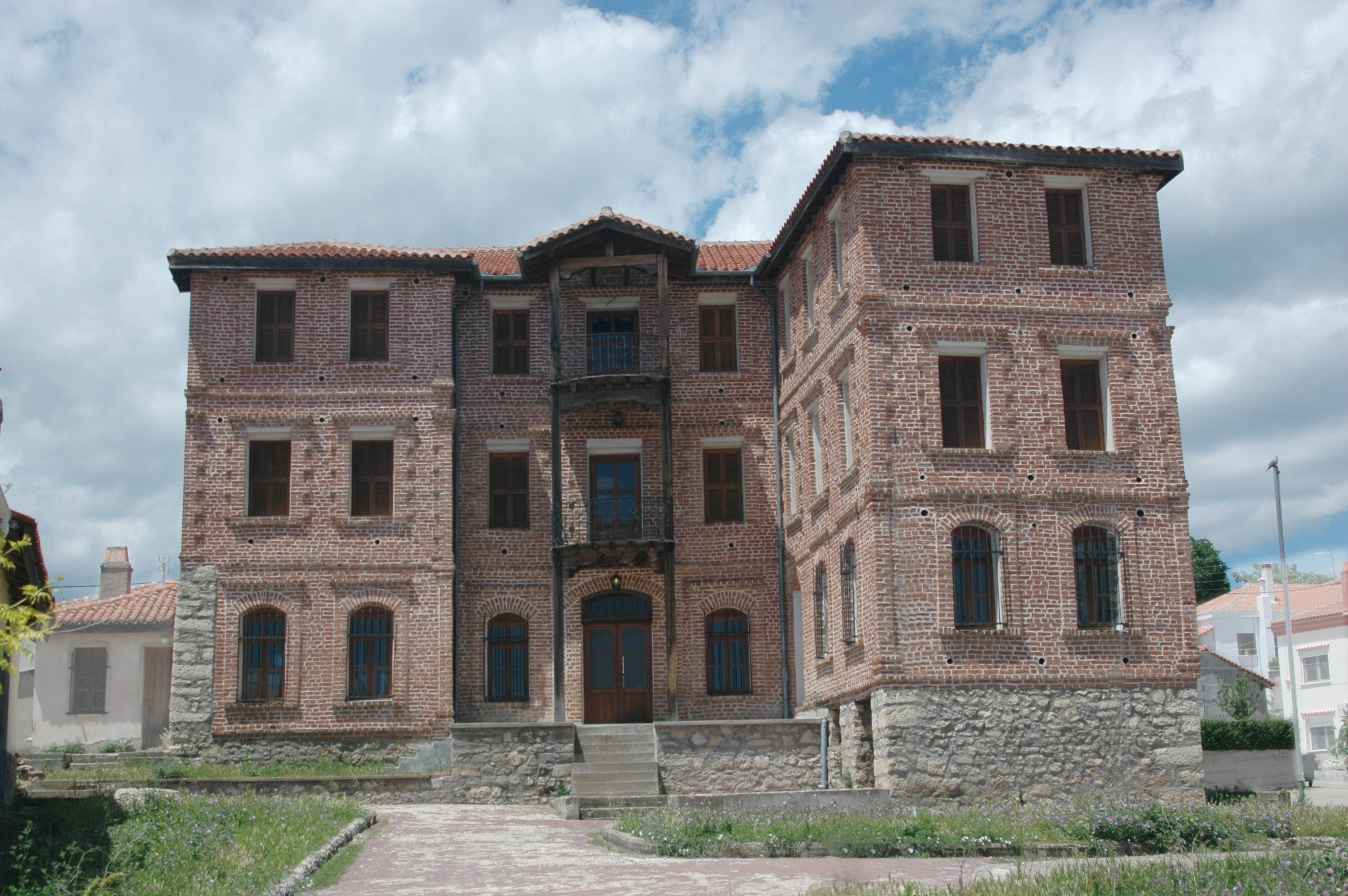 Αρχοντικό Μπρικά«Αρχοντικό Μπρικά»